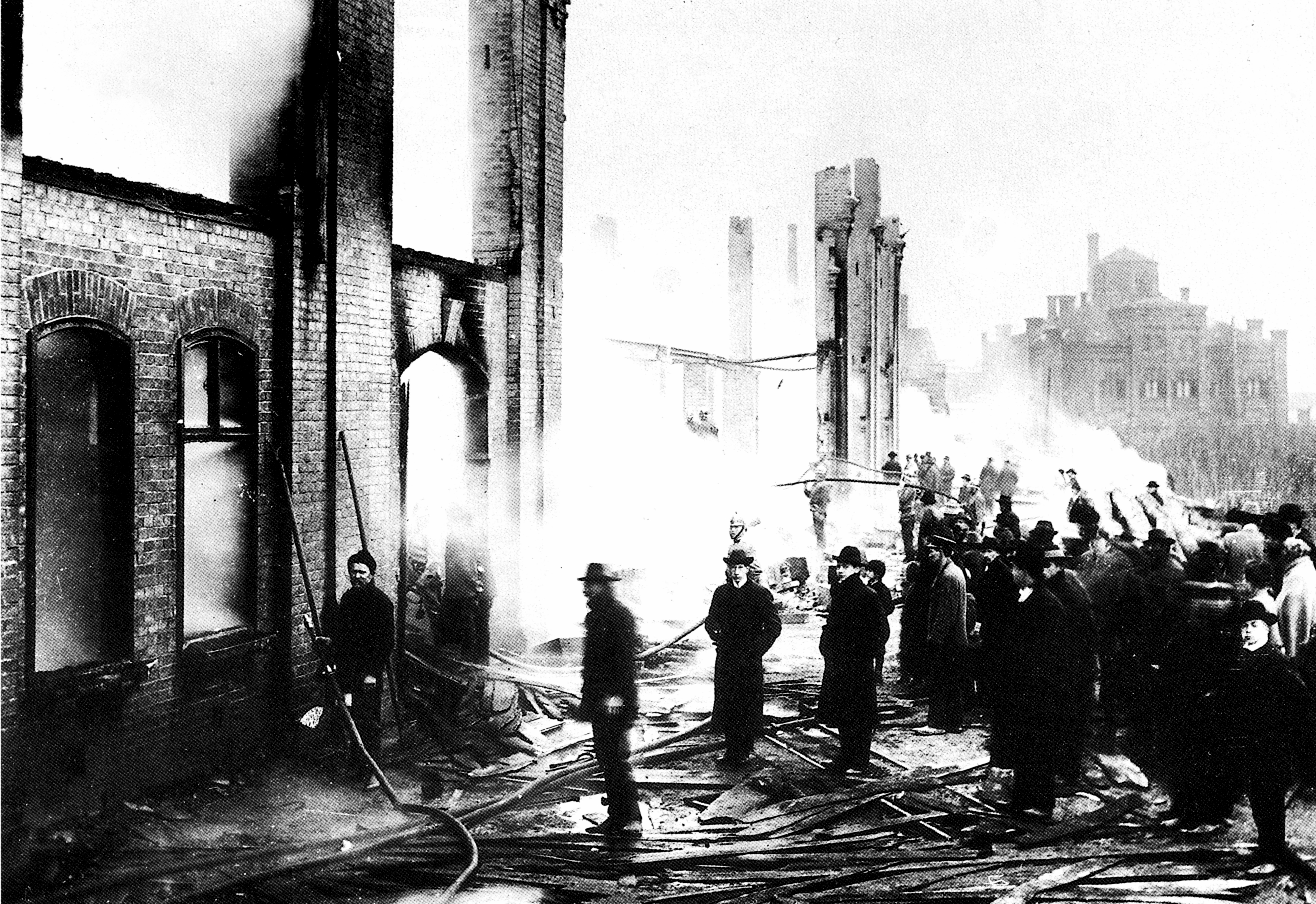 Brand der Möbelfabrik Bernhard Ludwig am 25. 11. 1902, Liesing, Färbermühlgasse. Im Hintergrund das Betriebsgebäude der Sarg-Werke